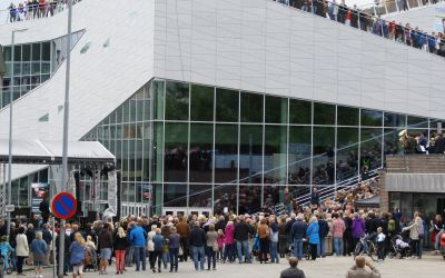 14. juli 2012 flyttet Molde bibliotek inn i ”Plassen”.